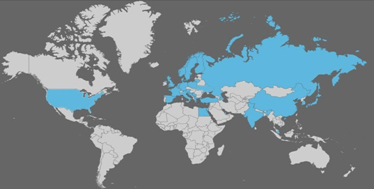 Во сино се означени државите кои користат Микросам производи